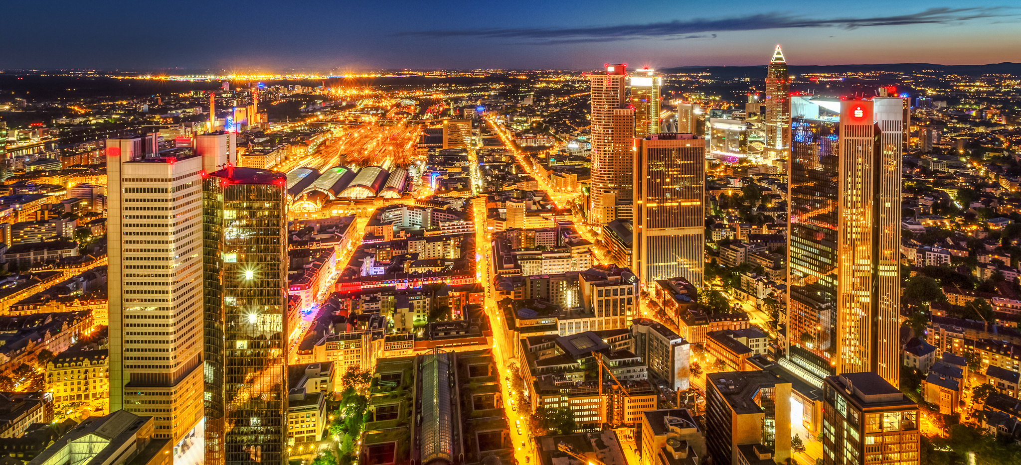 Frankfurt Skyline II - HDR